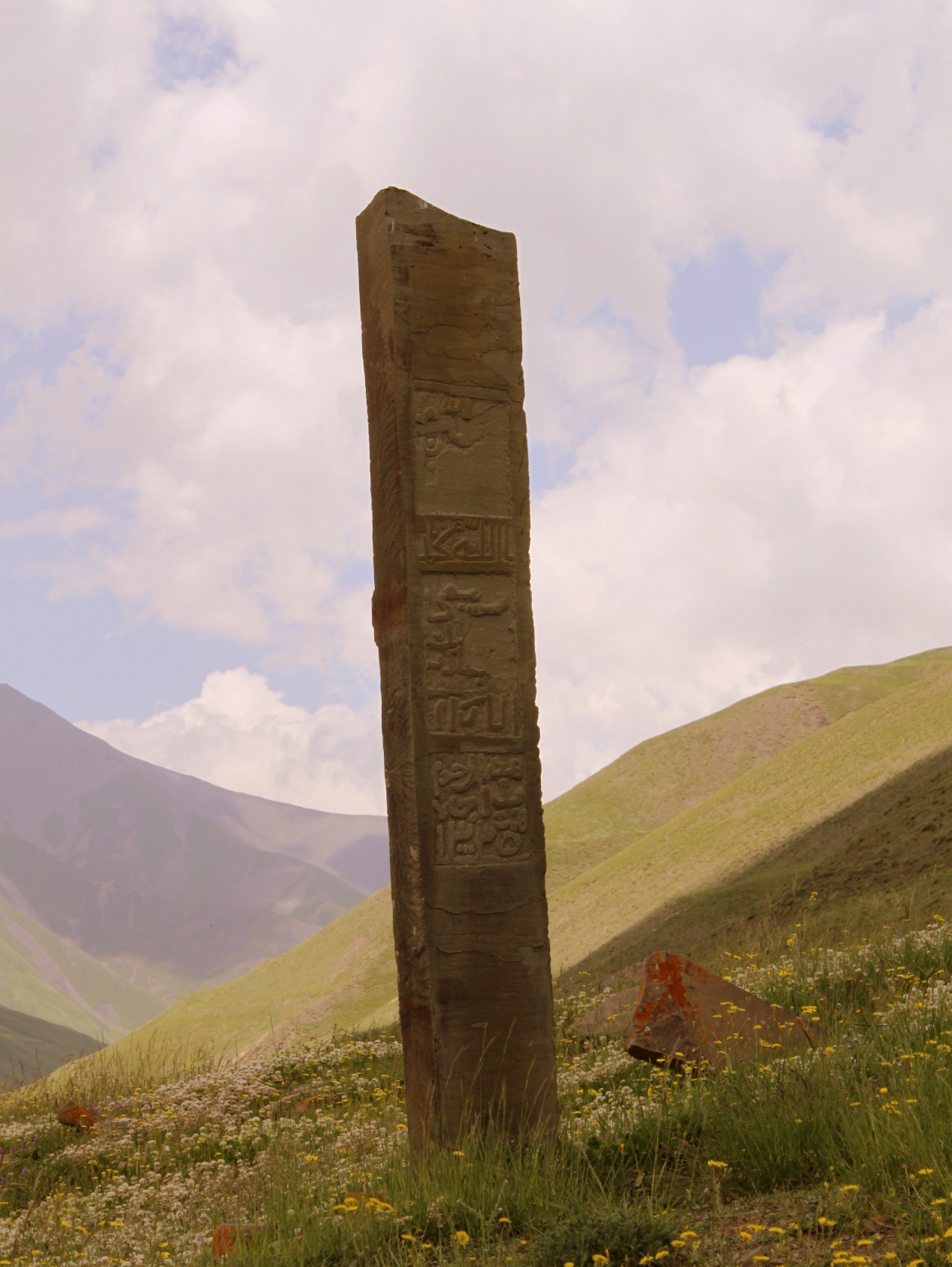 Надгробие, село Хыналыг Губинского района Азербайджана